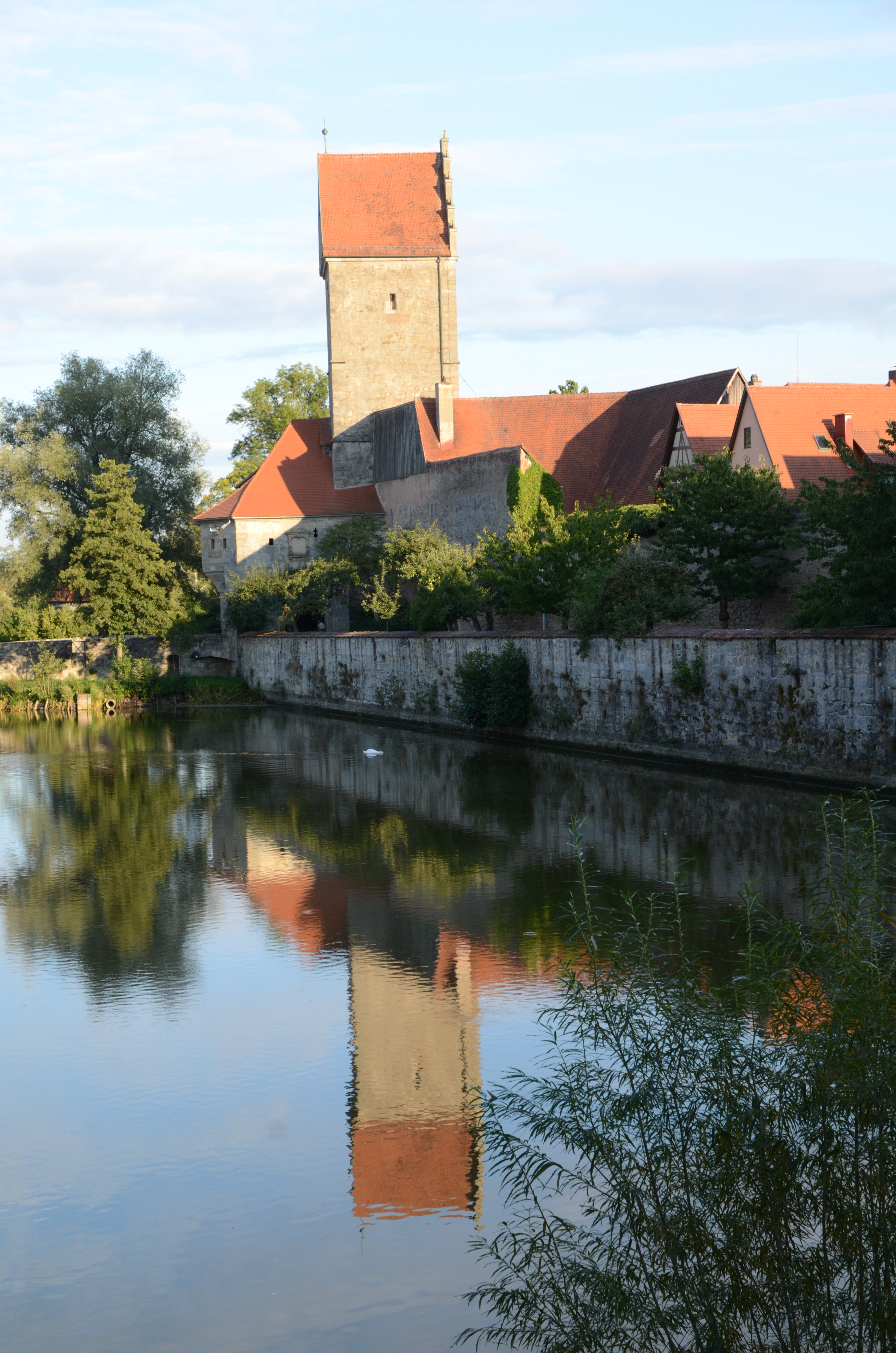 Rothenburger Tor (Dr. Martin Luther Straße 12) und Stadtmauer vom Stadtpark aus gesehenThis is a photograph of an architectural monument.